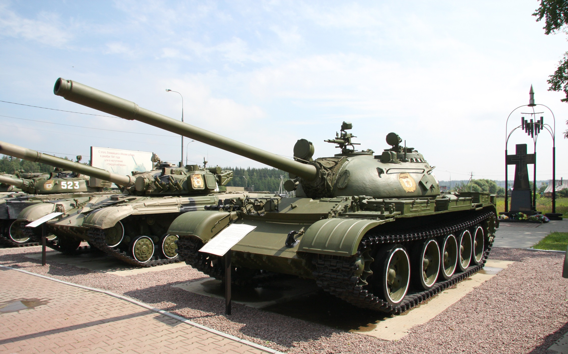 Т-55А